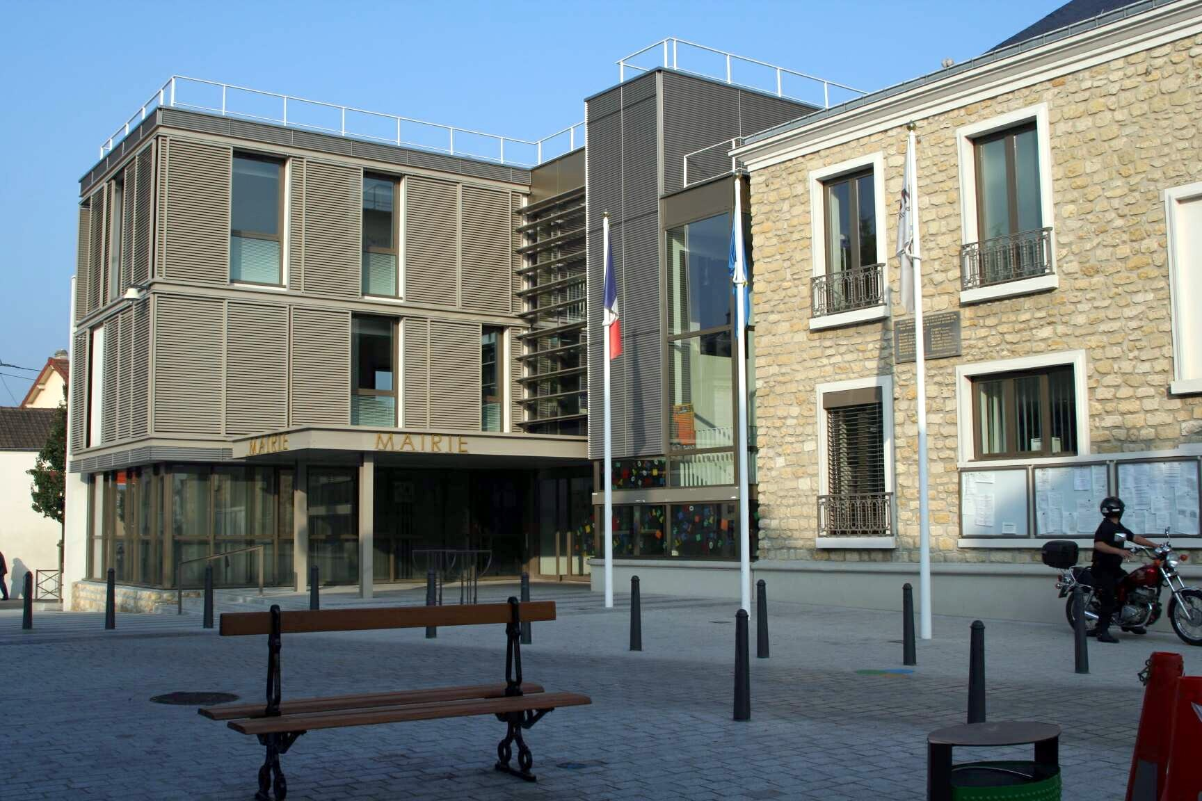 Mairie des Mureaux - Yvelines (France)